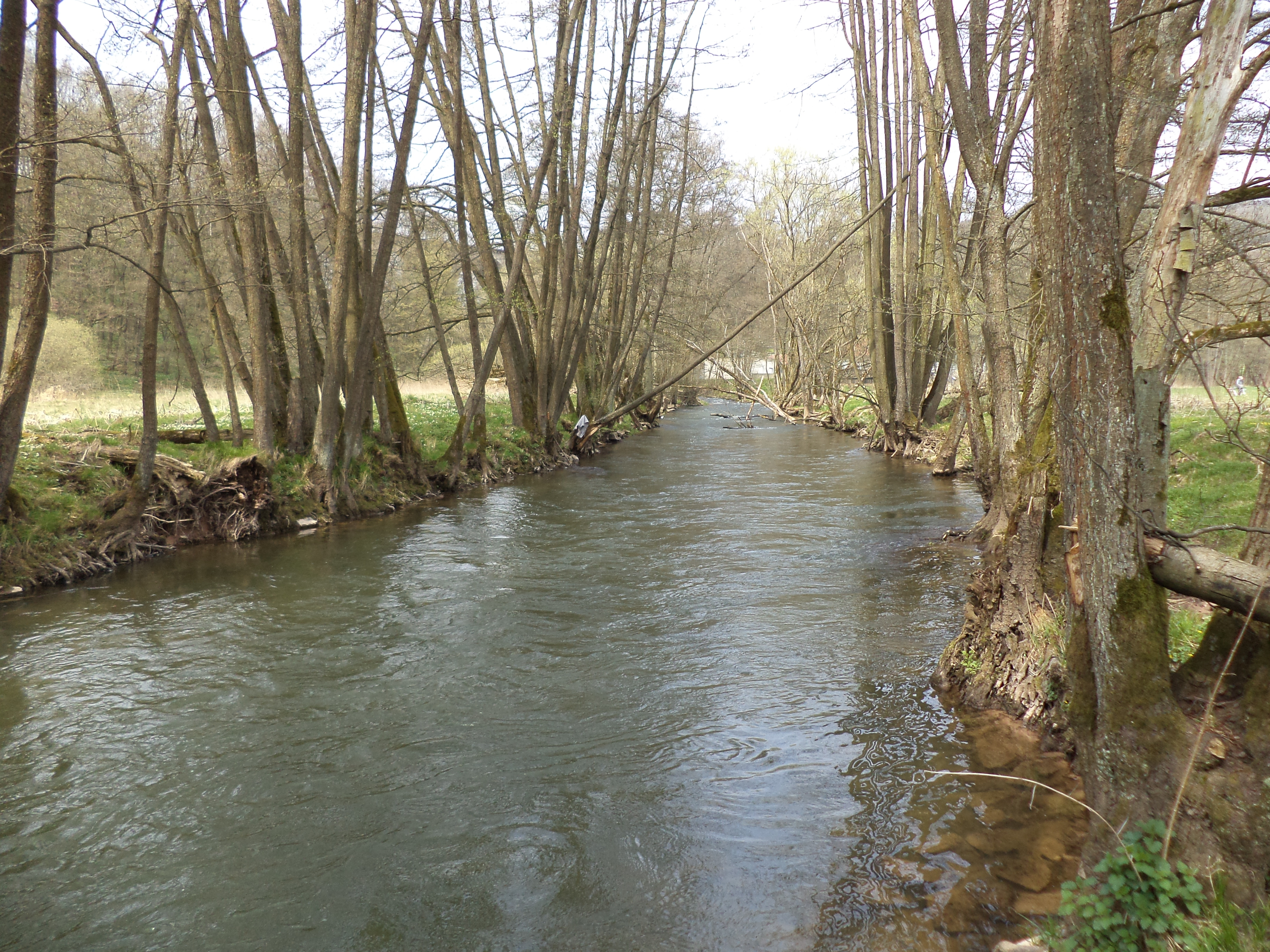 Die Sinn bei Sinntal-Jossa, Naturschutzgebiet „Sinnwiesen von Altengronau“